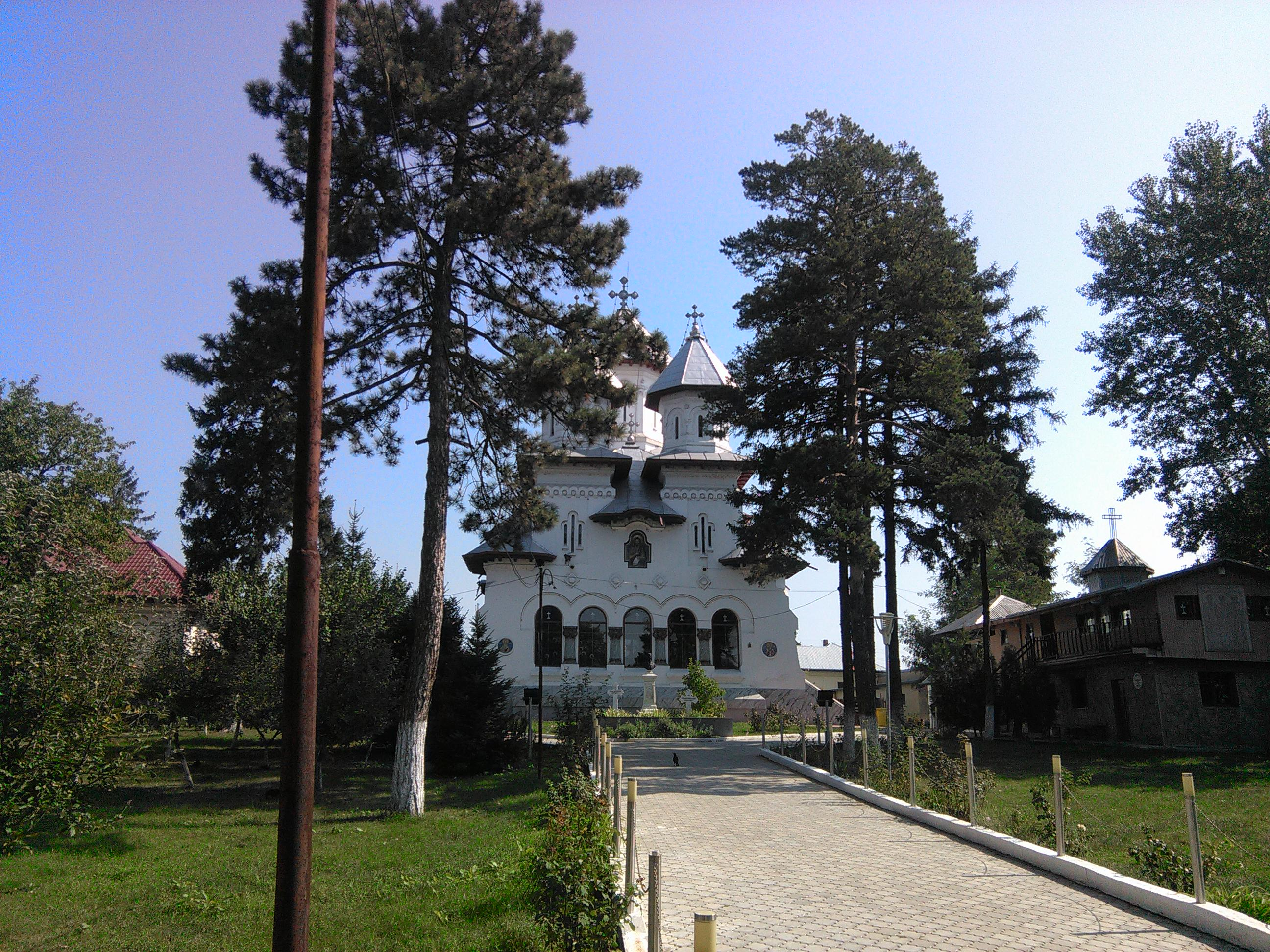 Biserica „Sfântul Ioan Botezătorul“ din Chitila